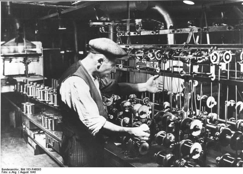 Belgischer Zwangsarbeiter bei Siemens ADN-ZB-Archiv II. Weltkrieg 1939-45 Ein von den Nazis zwangsverschleppter belgischer Arbeiter in der Spulerei der Siemens-Werke in Berlin, in der Lackdrähte aufgespult werden. (Aufnahme: August 1943) 3849-43 Belgishcer Arbeiter in der Spulerei der Siemens-Werke, in der lackdrähte aufgespult werden. Werkfoto Siemens, Scherl 19. August 1943 [Freigabedatum] 3849-43 3849-43